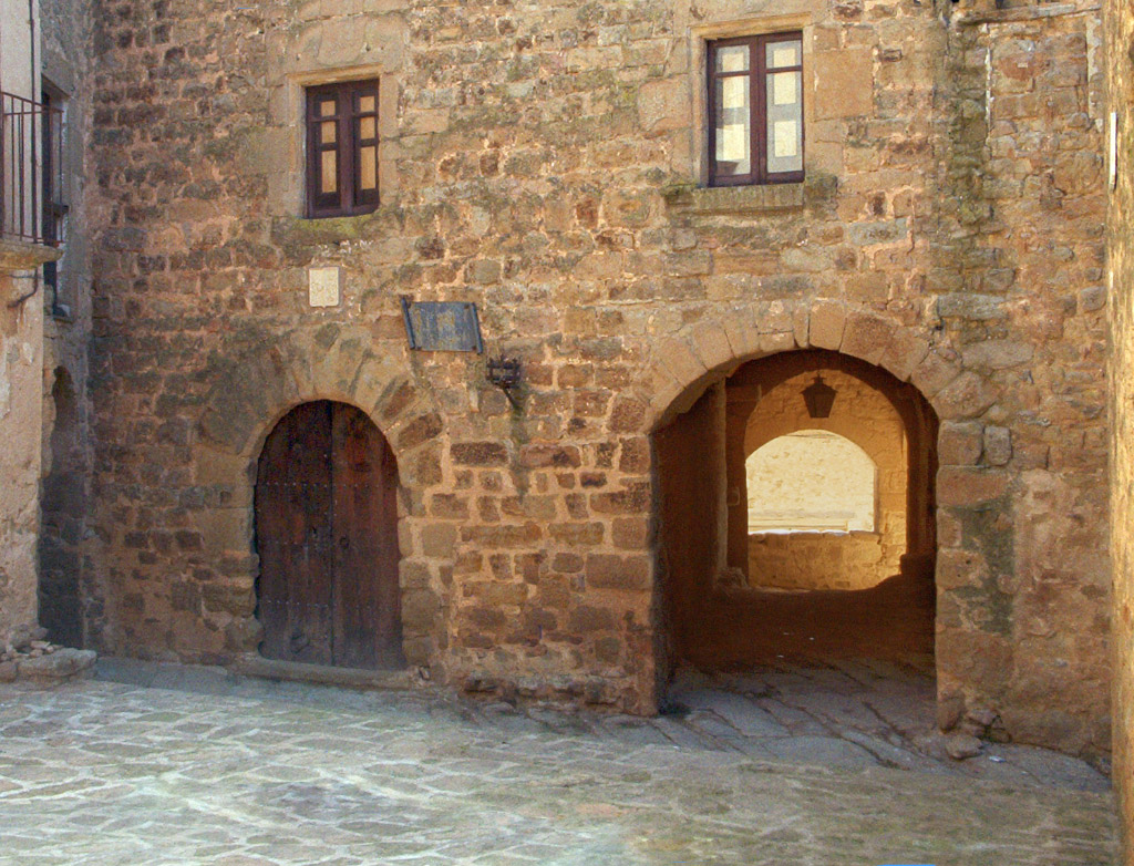 Plaça Major de Florejacs